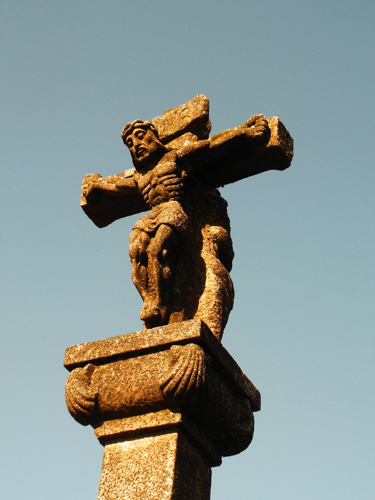 Crucero en O Cebreiro (Lugo, España).